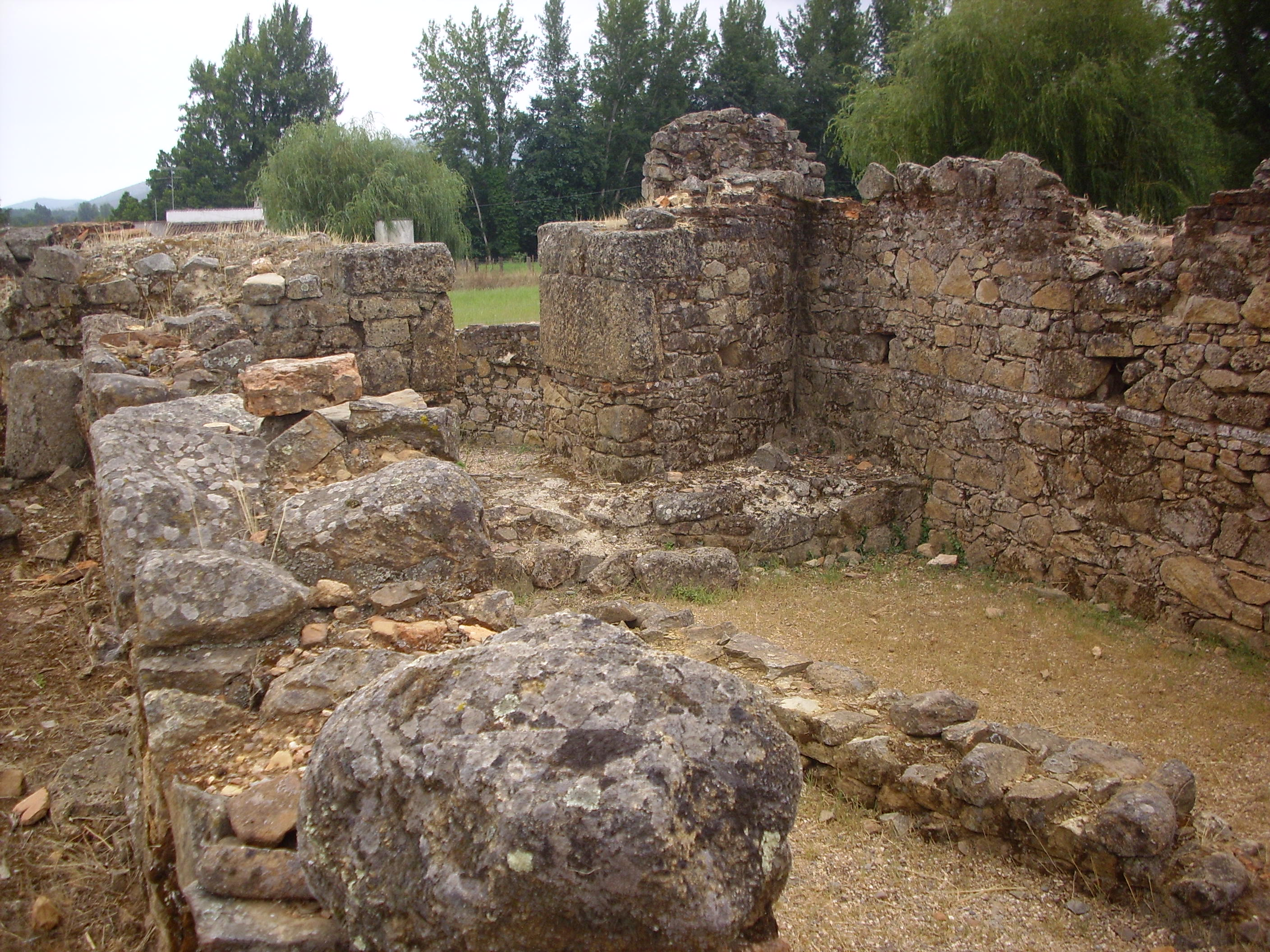 São Salvador da Aramenha - Marvão